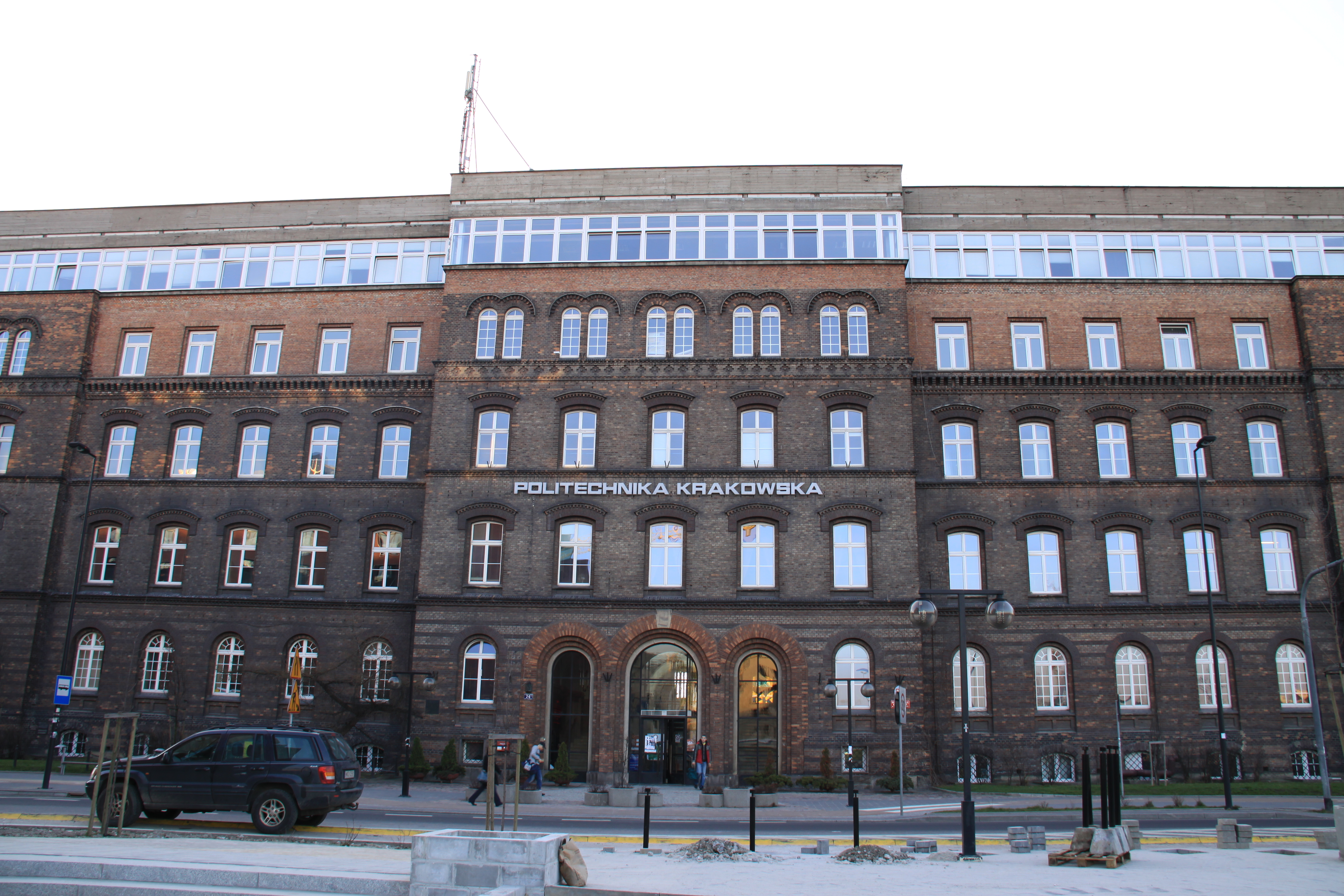 Politechnika Krakowska, główna fasada.